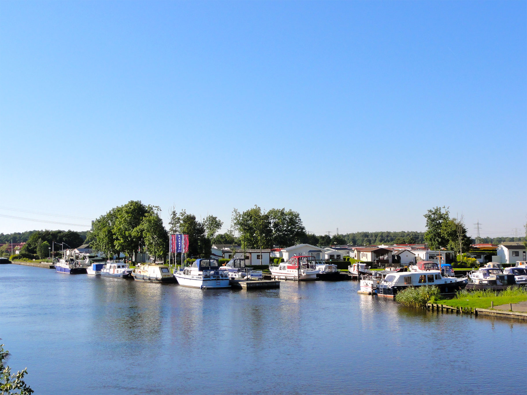 Kuikhornstervaart ten oosten van Noordbergum nabij de brug in de N355